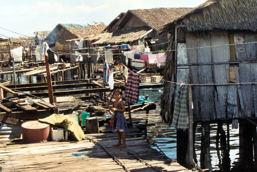 Philippinen Basilan Seezigeuner